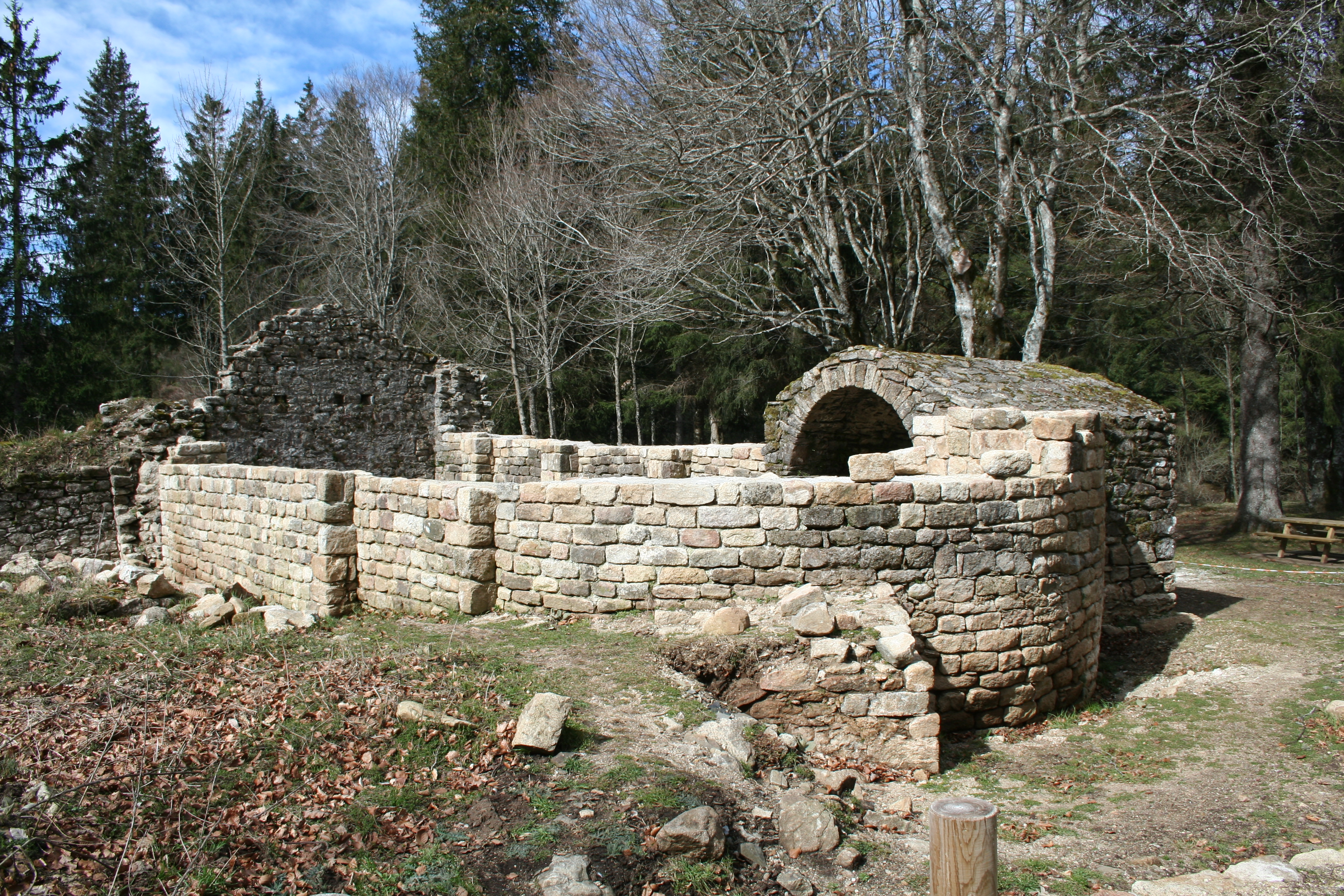 Cambon-et-Salvergues (Hérault) - Église St-Pierre de l'Espinouse (avant restauration).